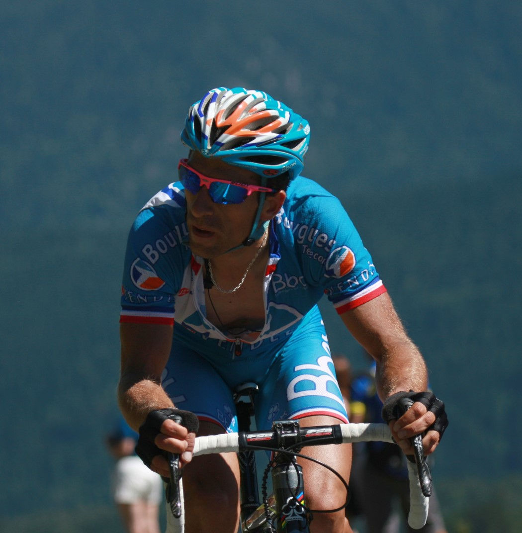 5545 vogondy